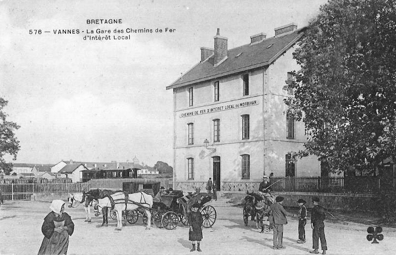 Vers 1910, la gare des chemins de fer d'intérêt local du Morbihan (CM), avec des voitures en attente.